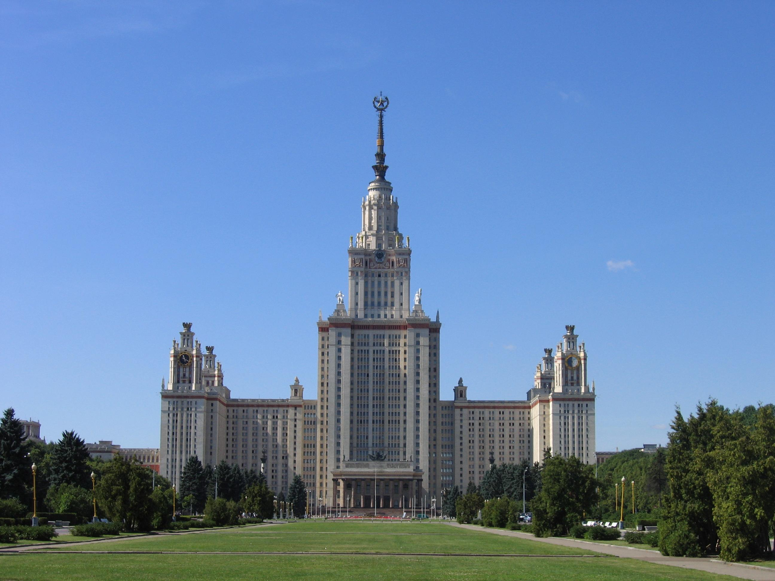 Główny budynek uniwerstytetu w Moskwie